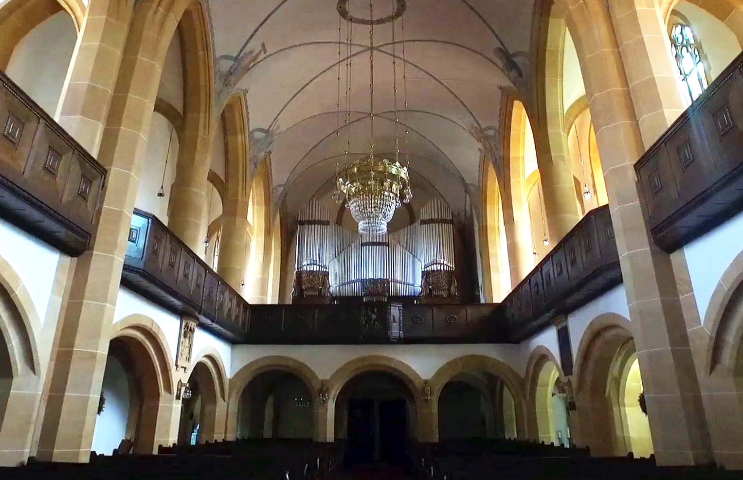 Blick vom Westchor in das Langhaus der Heilig-Kreuz-Kirche in Röthenbach an der Pegnitz. Das Relief in der Mitte der Emporenbrüstung vor der Orgel zeigt den harfespielenden König David.